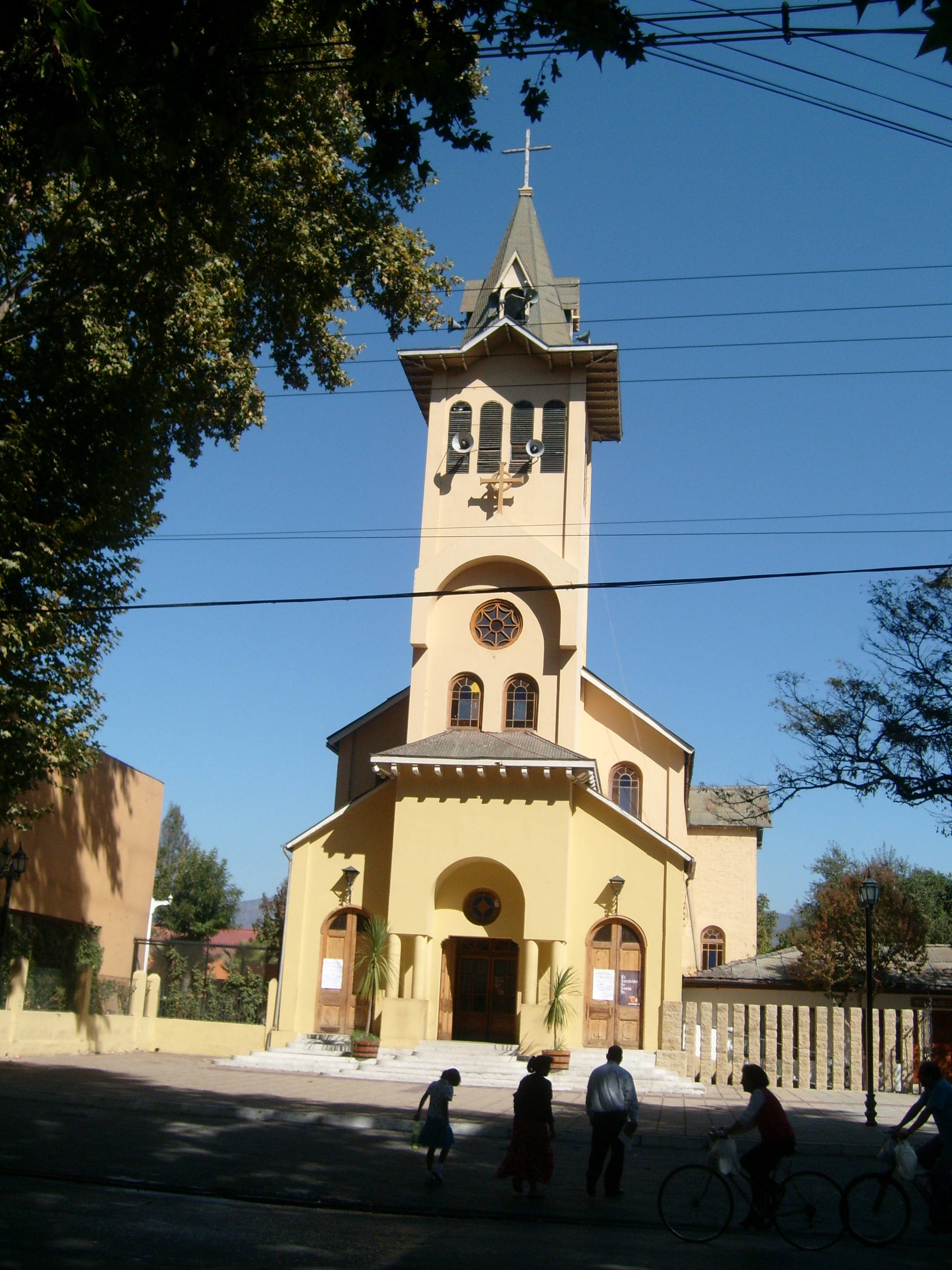 La Merced de Isla de Maipo, church